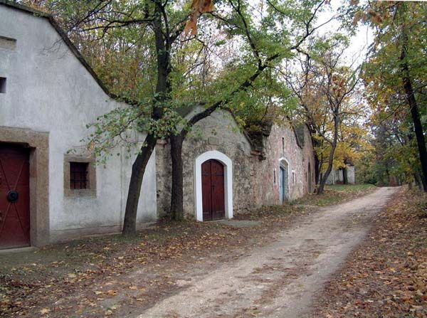 Páty, pincesor